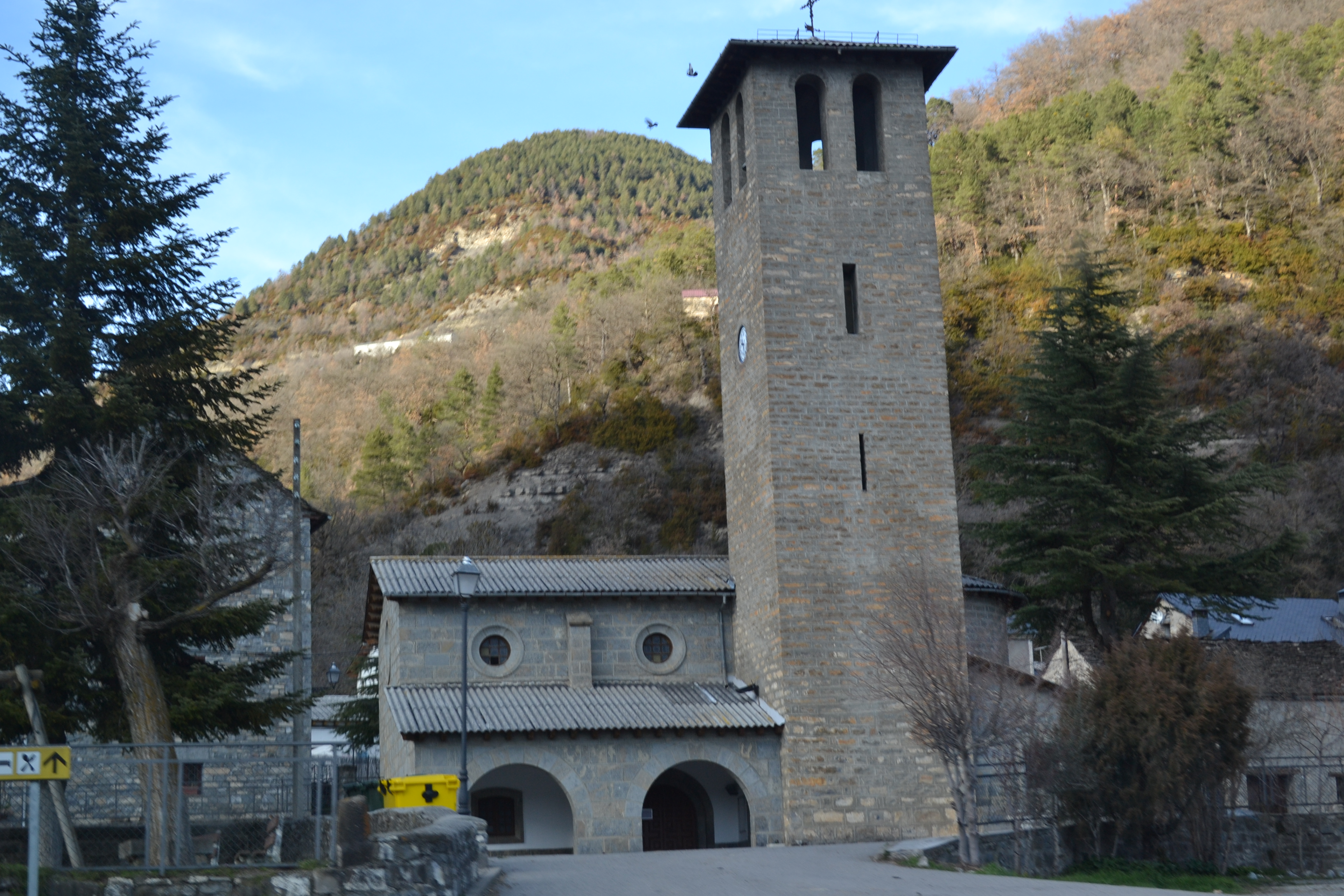 Iglesia de la Natividad, Sarvisé, Broto, Huesca, España